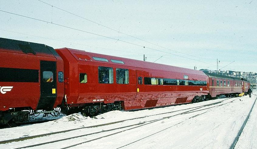 Den nye Kongevogna i februar 1994.